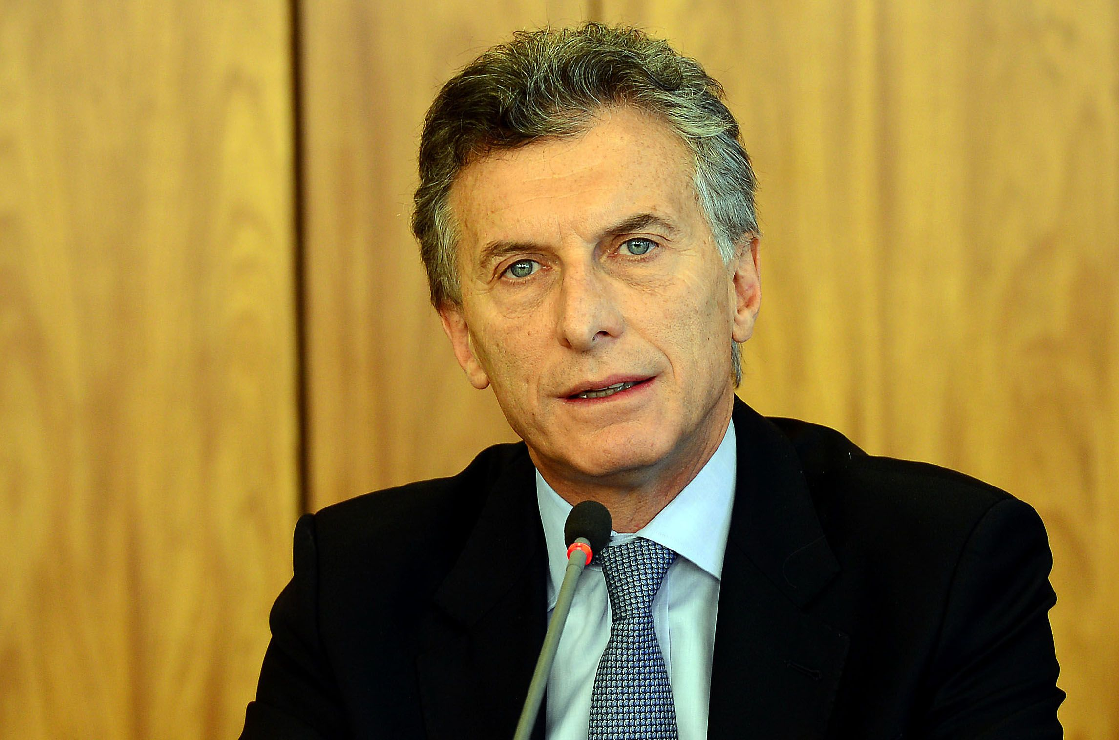 Brasília - Entrevista coletiva do presidente eleito da Argentina, Mauricio Macri, no Palácio do Planalto.